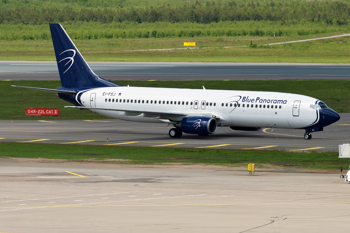 Blue Panorama, EI-FSJ, Boeing 737-86N